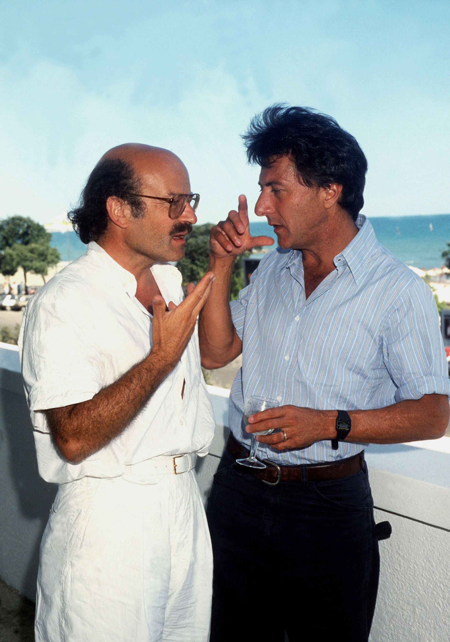 L'attore americano Dustin Hoffman con il regista Volker Schlondorff alla Mostra del cinema di Venezia del 1984